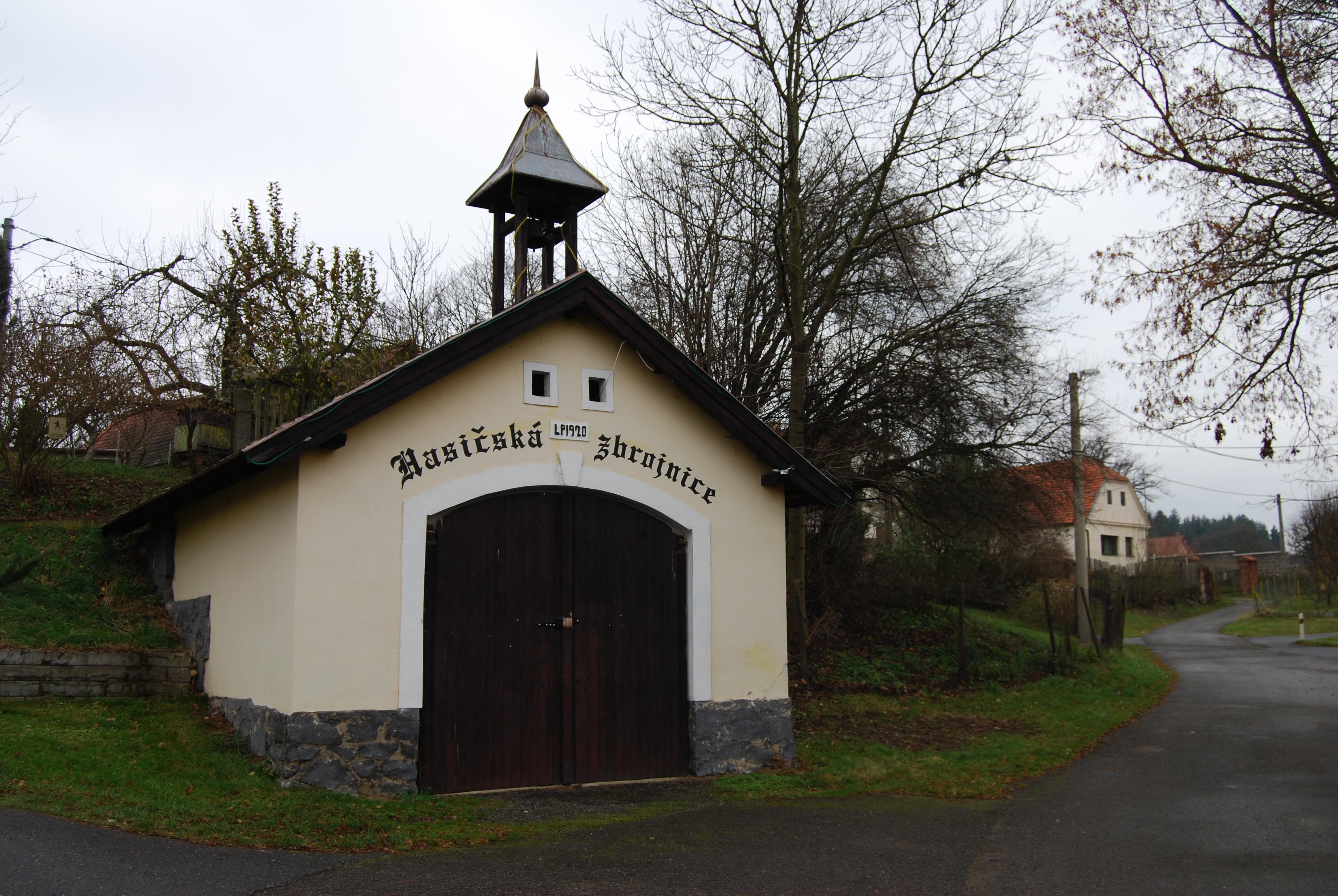 Hasičská zbrojnice se zvonicí. Počaply se nachází v okrese Příbram, kraj Středočeský. Česká republika.